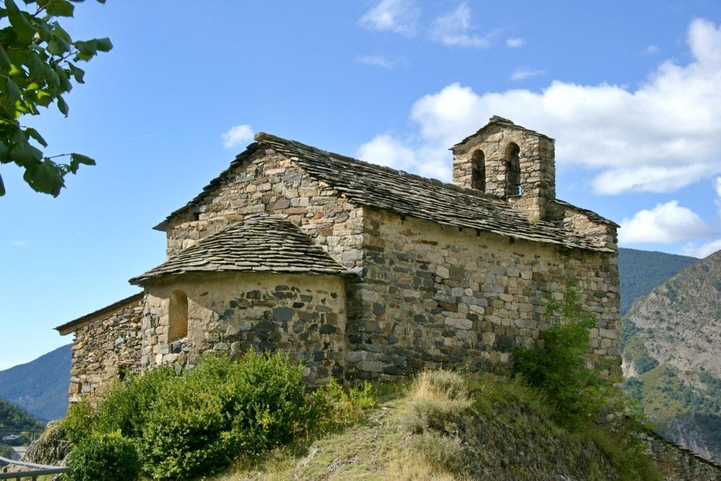 Església de Sant Serni de Nagol, Sant Julià de Lòria, Andorra.